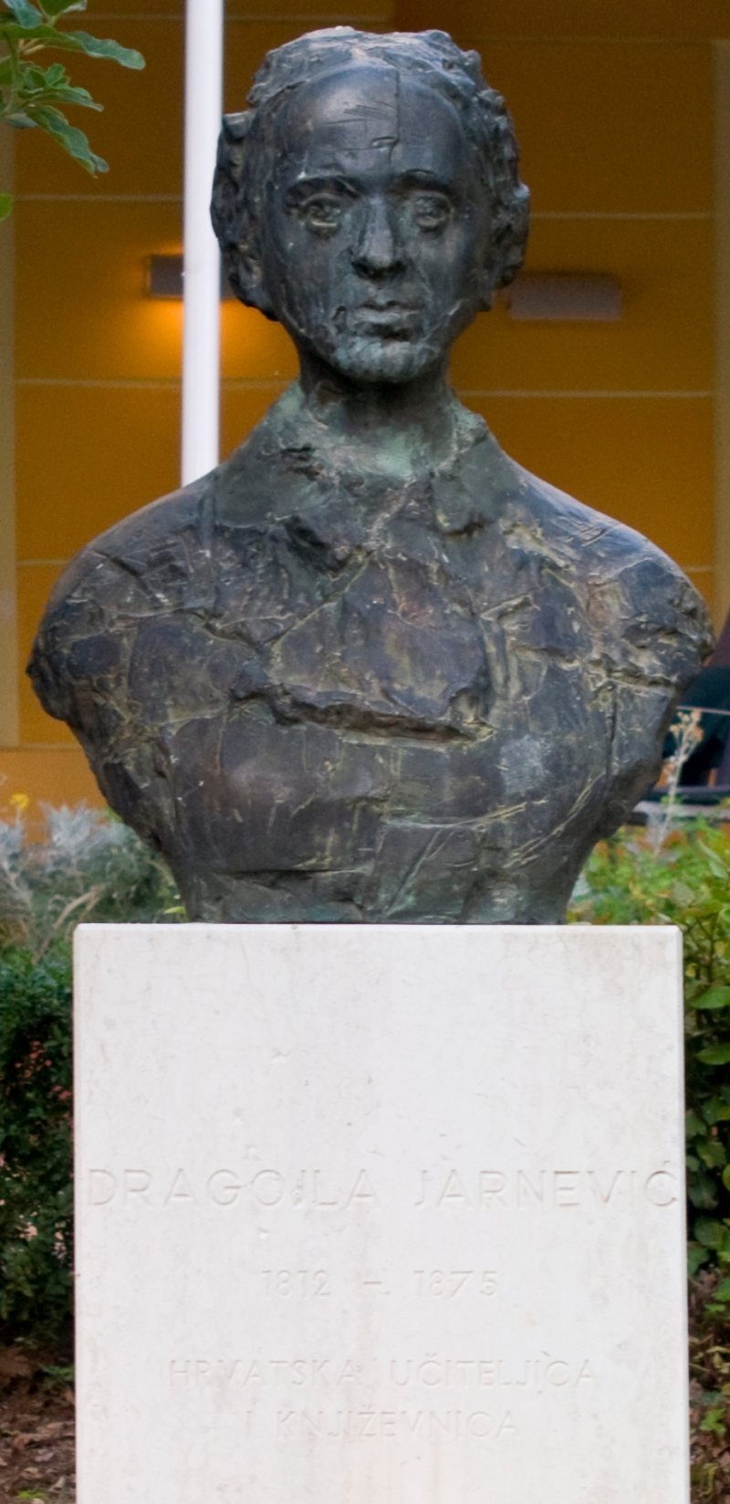 spomenik Dragojli Jarnević u Crikvenici